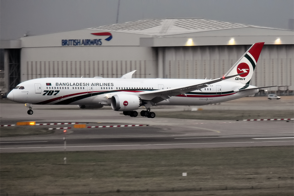 Biman Bangladesh Airlines, S2-AJX, Boeing 787-9 Dreamliner